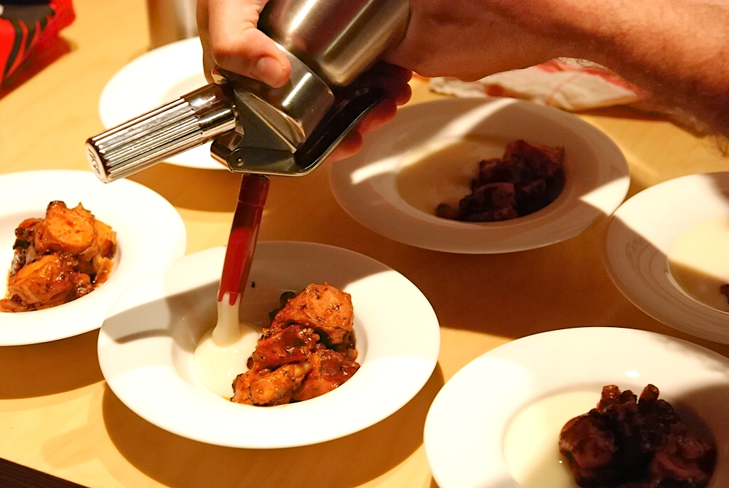 Zubereitung von Kartoffel-Schaum (Espuma) durch Aufschäumen von flüssigem „Kartoffelpüree“ mit Hilfe von Lachgas und einem Sahnesiphon. Das Kartoffel-Espuma dient hier als Beilage zu einem Tintenfischgericht.